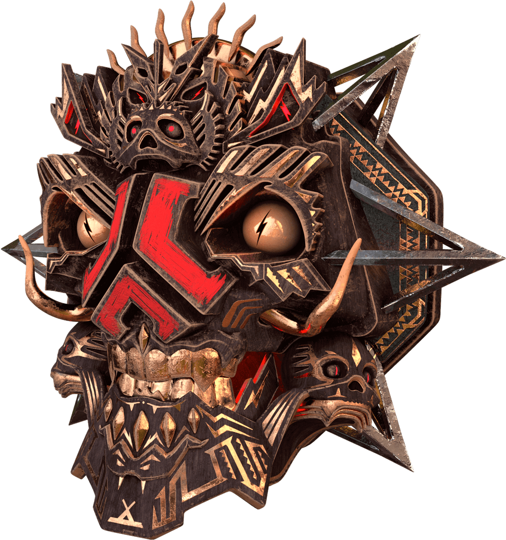 Mask for Defqon.1 2019